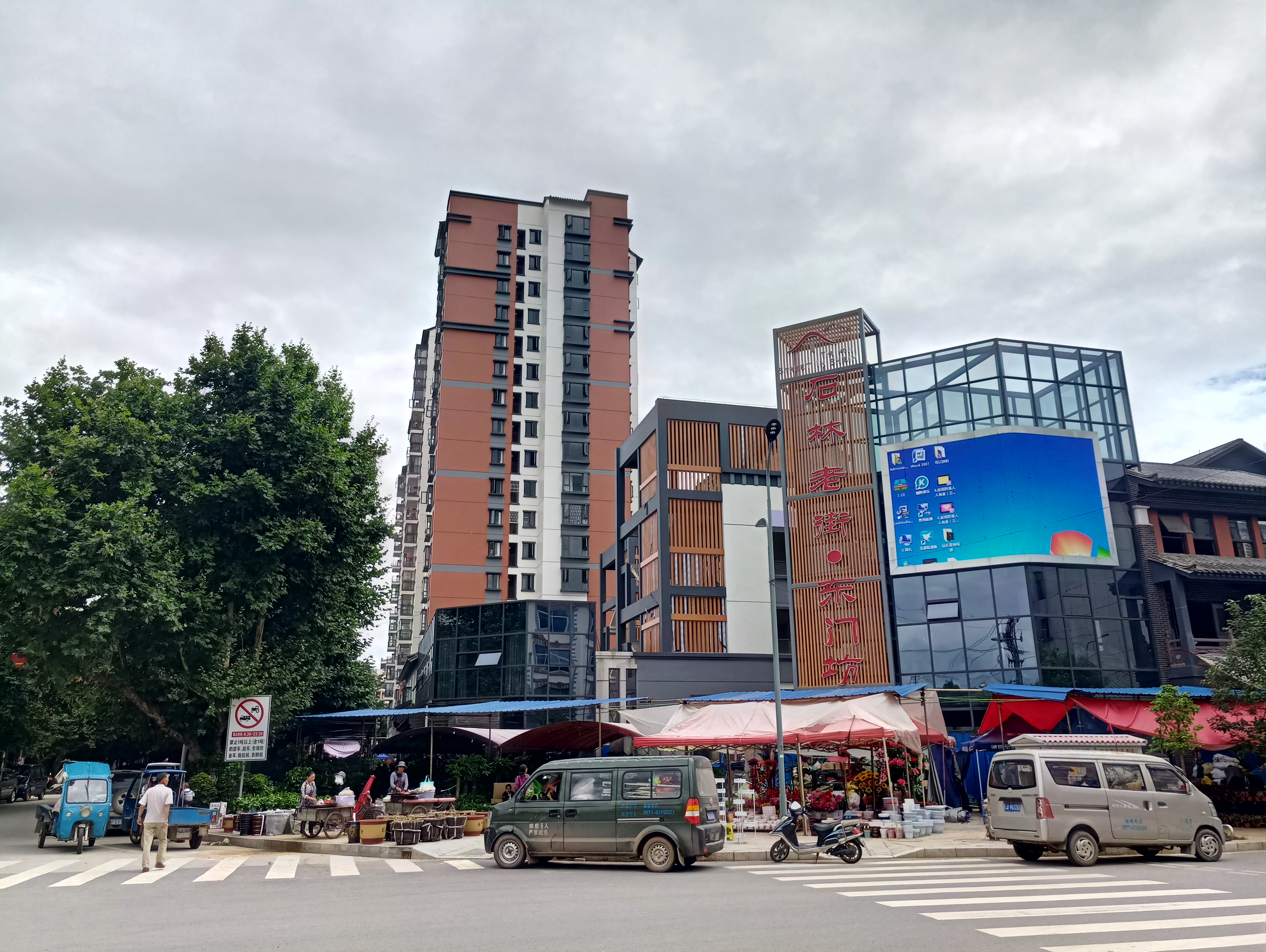 中文（中国大陆）: 石林县老街东门坊商业中心